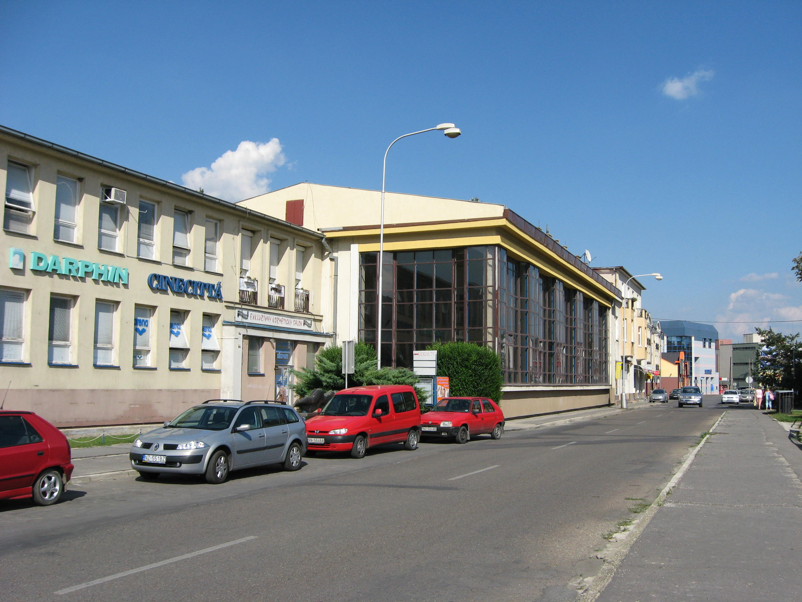 Swimming pool in Nové Zámky